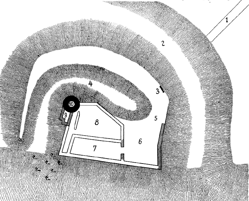 Chřenovice – půdorys hradu od Vojtěch Krále z Dobré Vody publikovaný roku 1900; popis: 1 – cesta, 2 – příkop, 3 – první brána, 4 – příkop, 5 – druhá brána, 6 – předhradí, 7 – stáje, 8 – nádvoří, 9 – příbytek, 10 – bergfrit